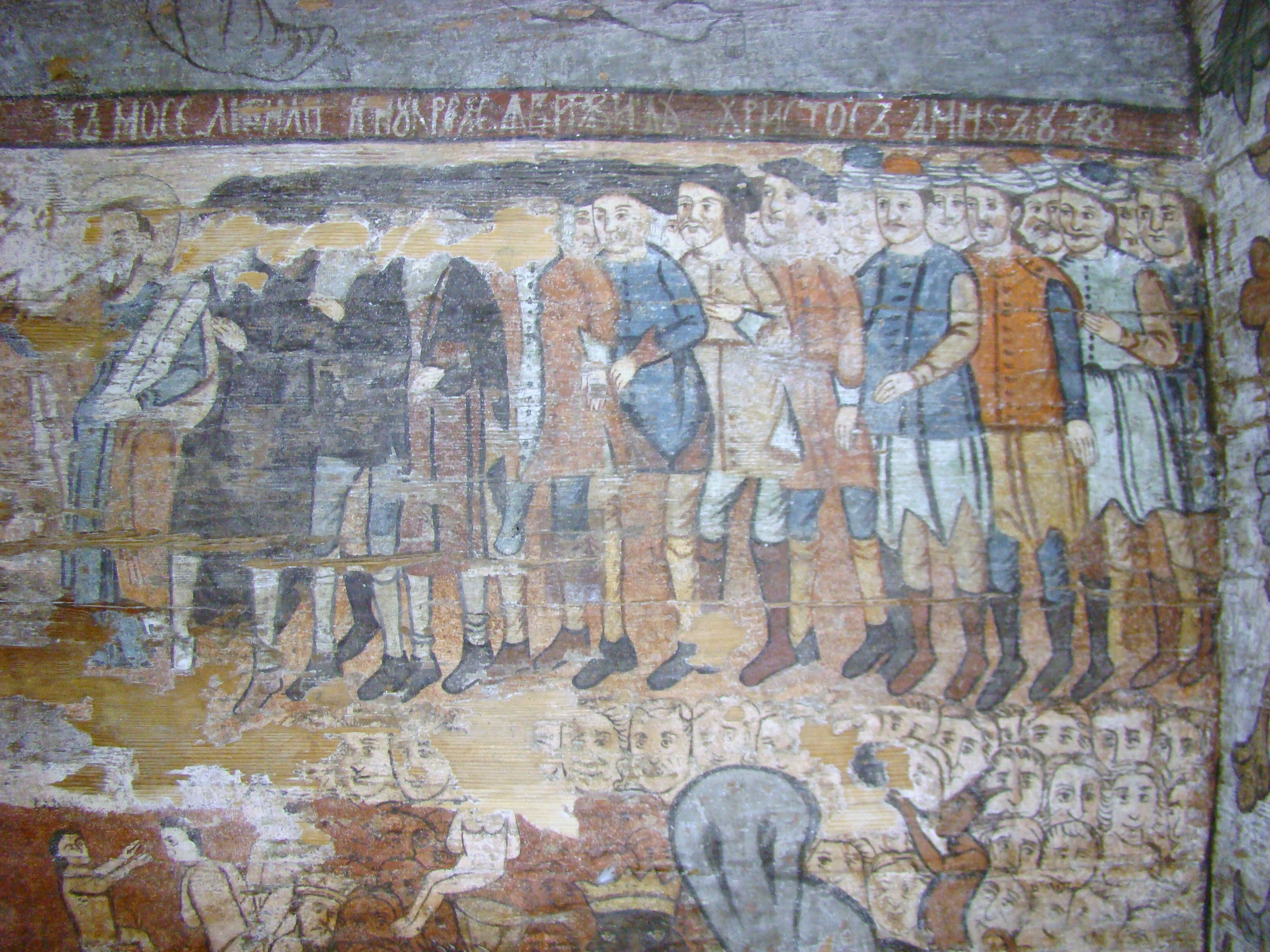 Biserica de lemn "Sfântul Nicolae", sat BOGDAN VODĂ